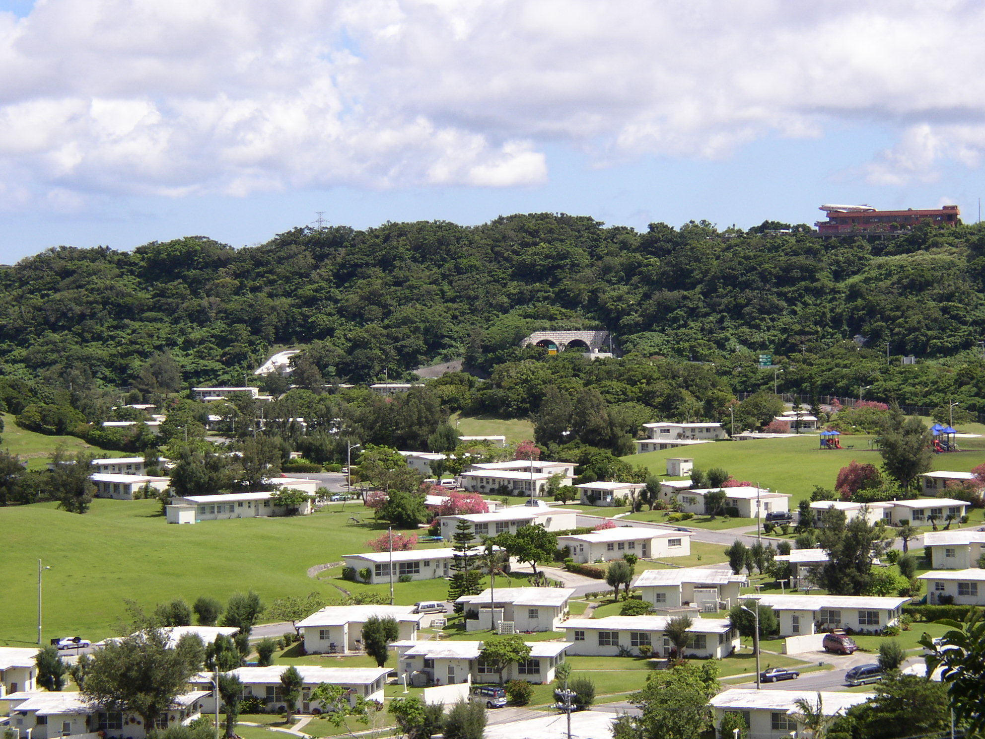 camp foster housing.jpg